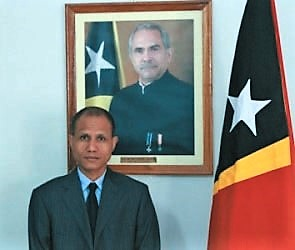 Vicente Fernandes e Brito